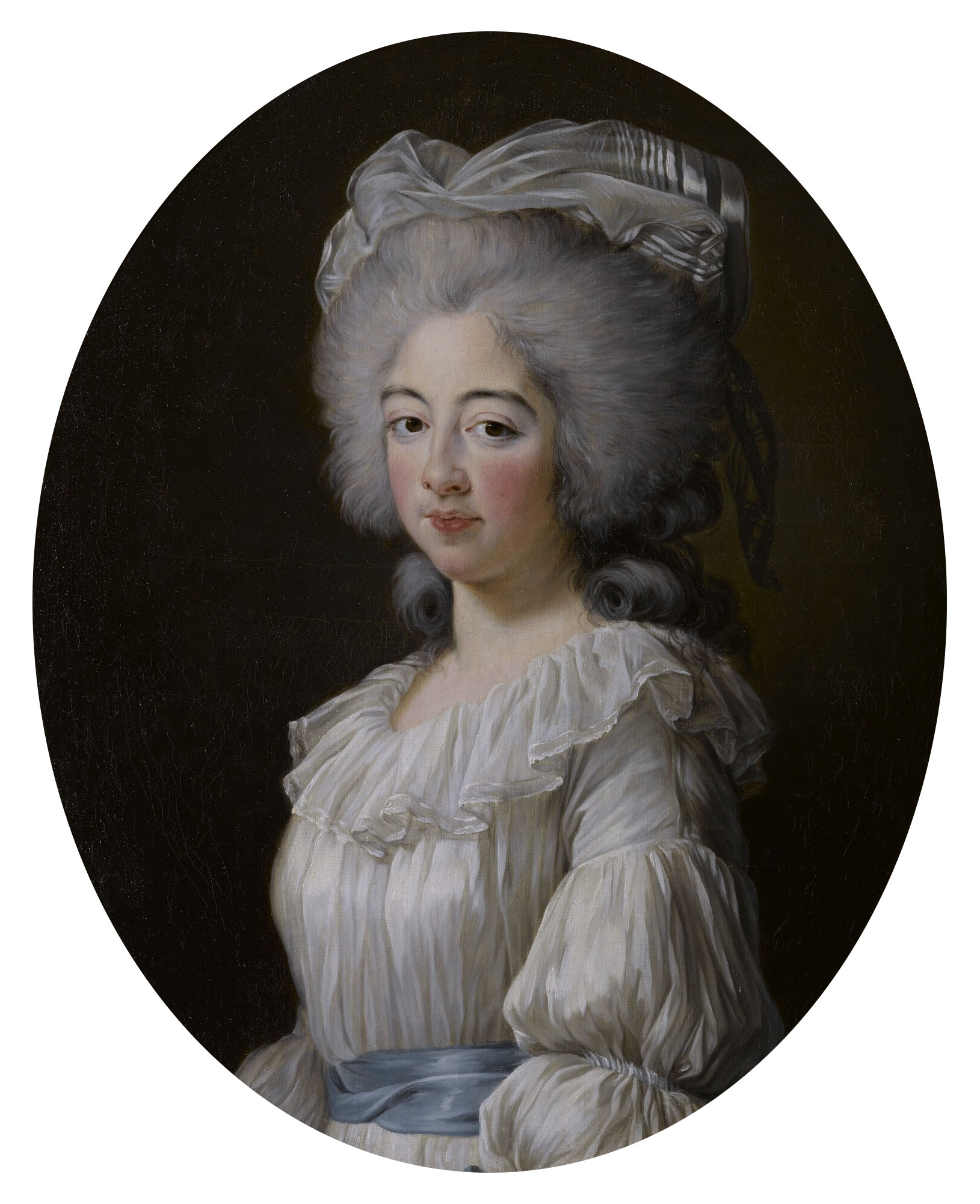 Marie Joséphine of Savoy